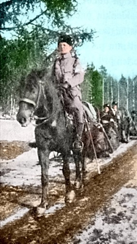 Description